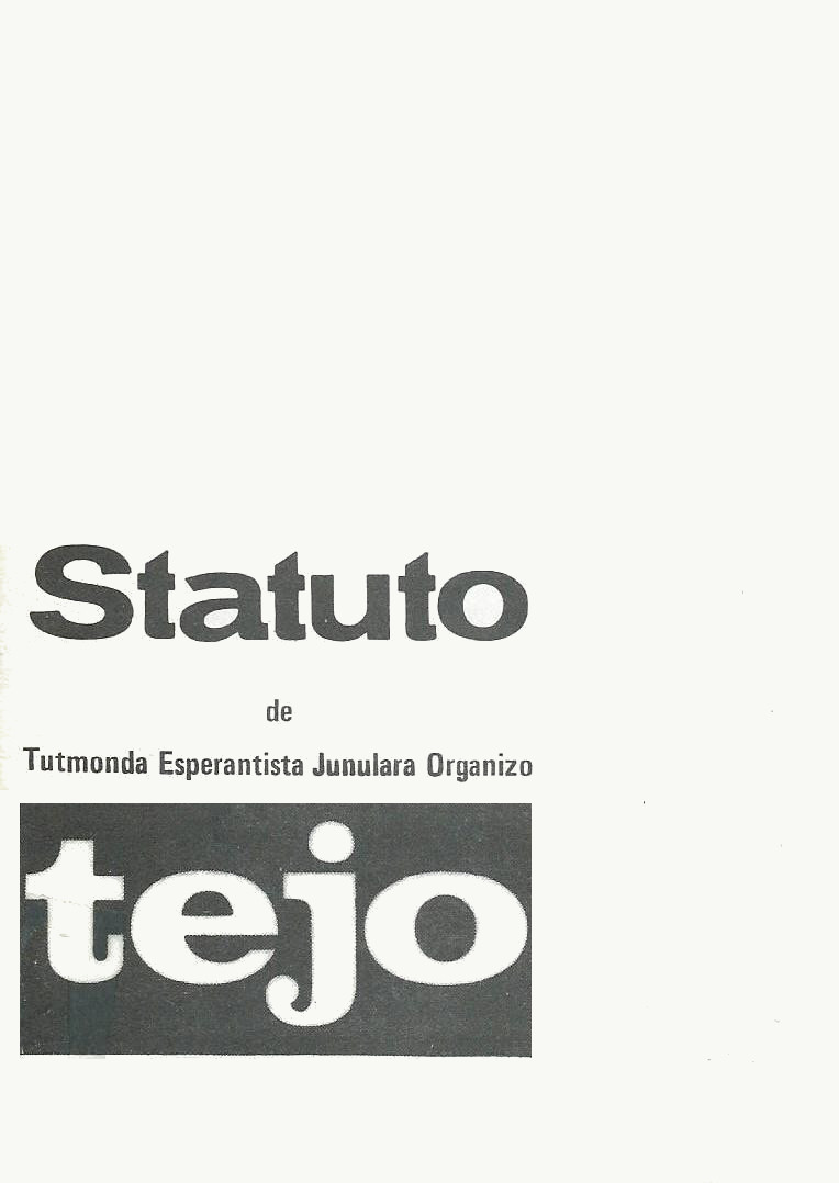 librokovrilo de "Statuto_de Tutmonda Esperantista Junulara Organizo", 1978